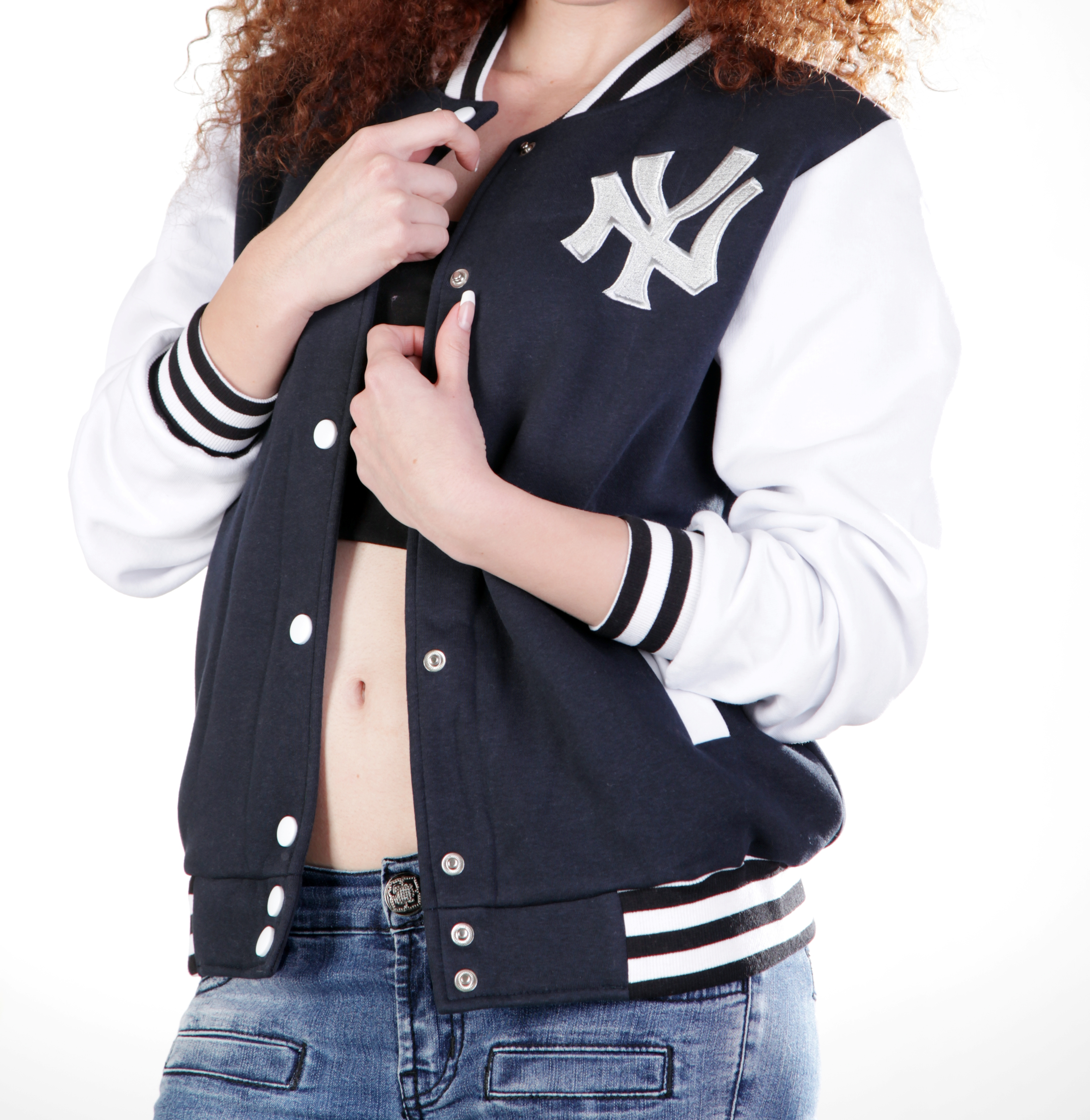 Бомбер